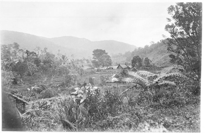 Foto. Deze foto is gemaakt tijdens de Sumatra Expeditie van 1877-1879. Landschappen uit de Padangsche Bovenlanden.. Het dal van de Batang Lolo bij de pasar, Padangse Bovenlanden, Sumatra`s Westkust